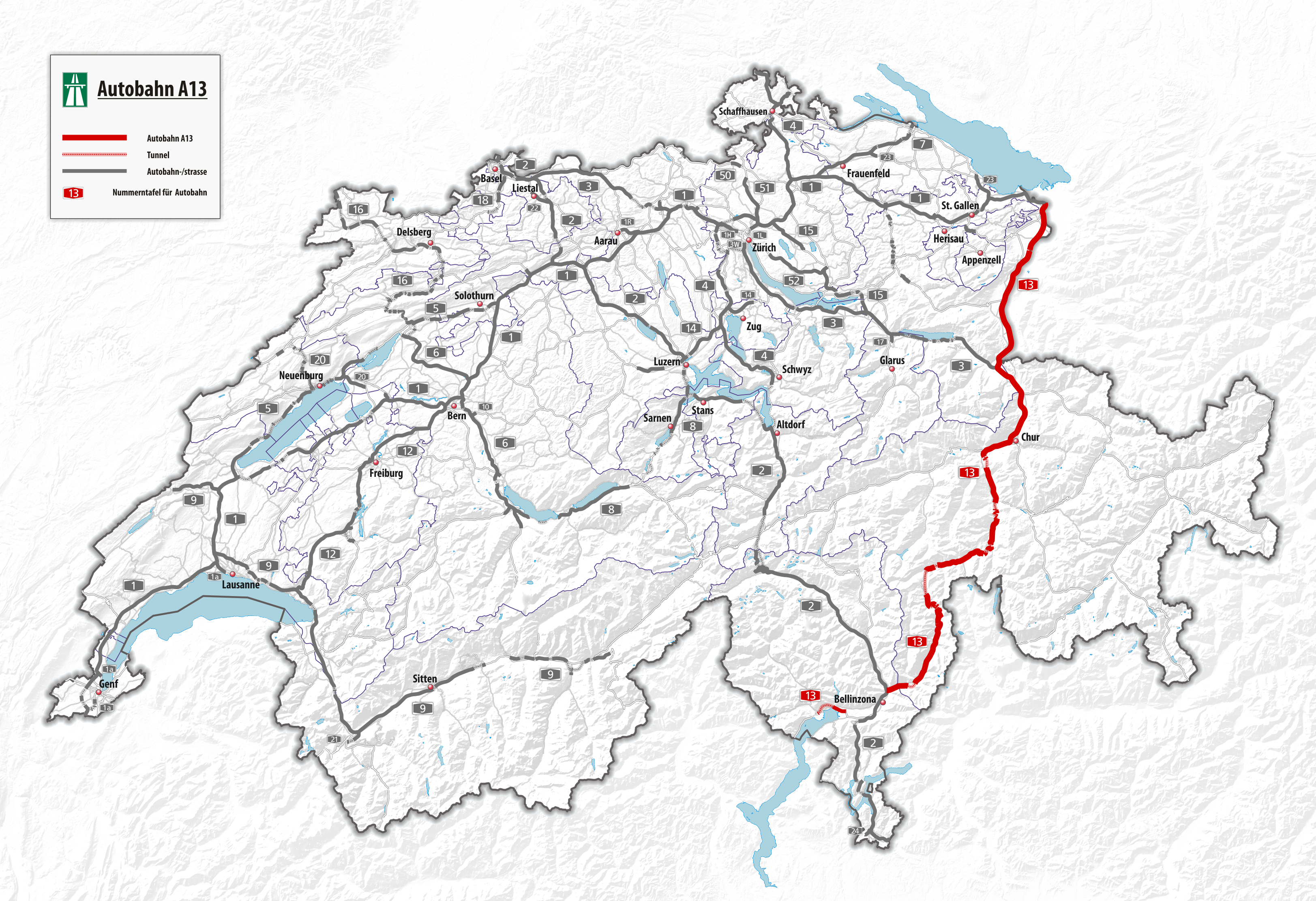 Autobahn A13 Stand 2018